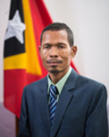 Patrocínio Fernandes dos Reis, Abgeordneter des Nationalparlaments Osttimros